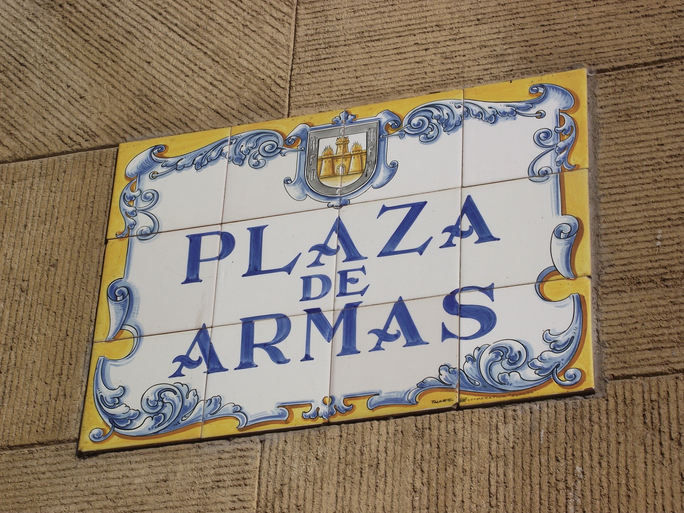 Mosaico que señaliza la ubicación de la Plaza de Armas de La Serena, colocado en los edificios que rodean a dicha plaza.